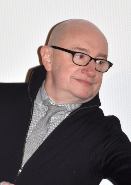 Michel Blanc à l'avant-première du film Une petite zone de turbulences.